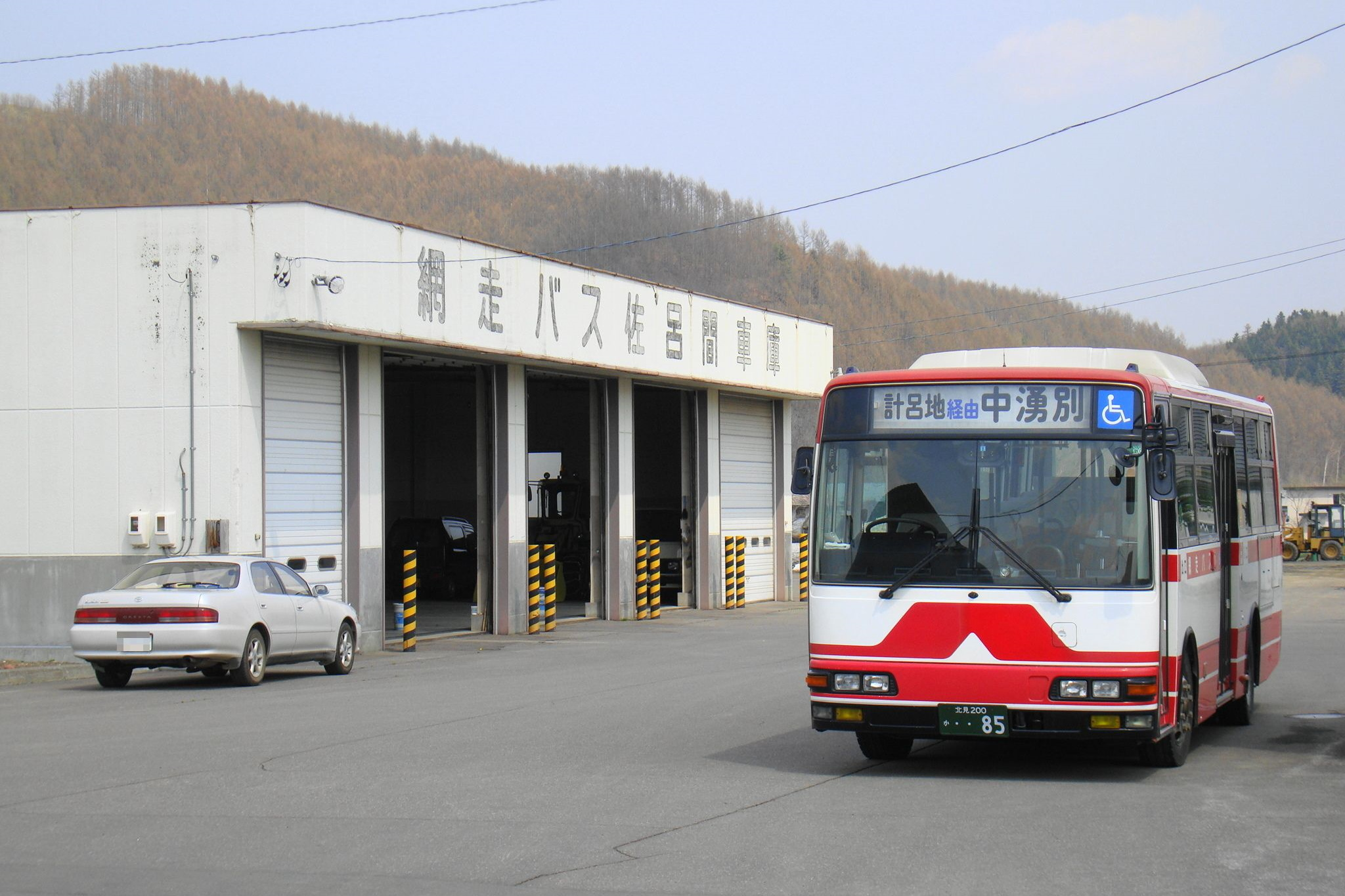 Saroma galage